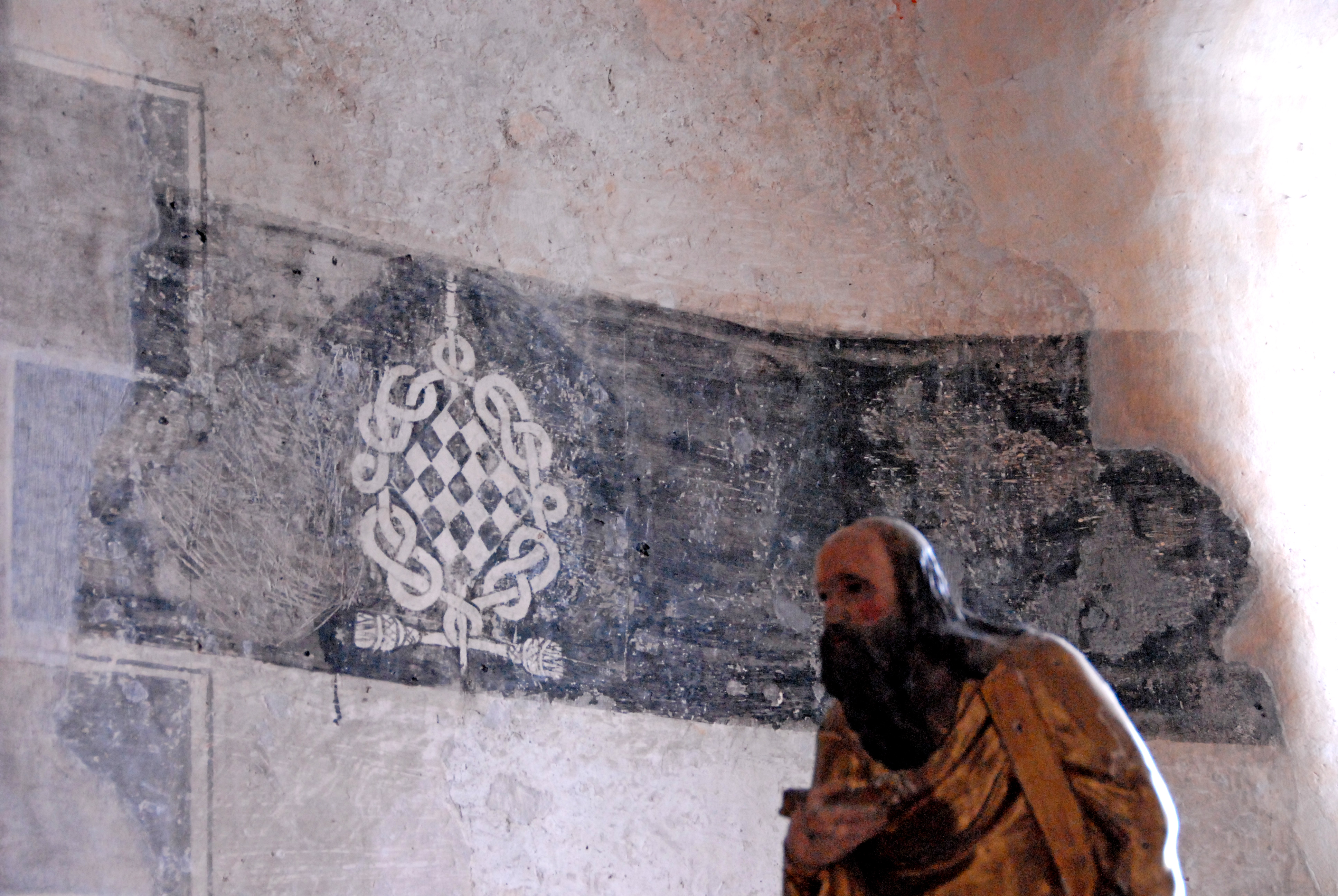 Kirche St.-André Lavaudieu, Chor, Begräbnislita